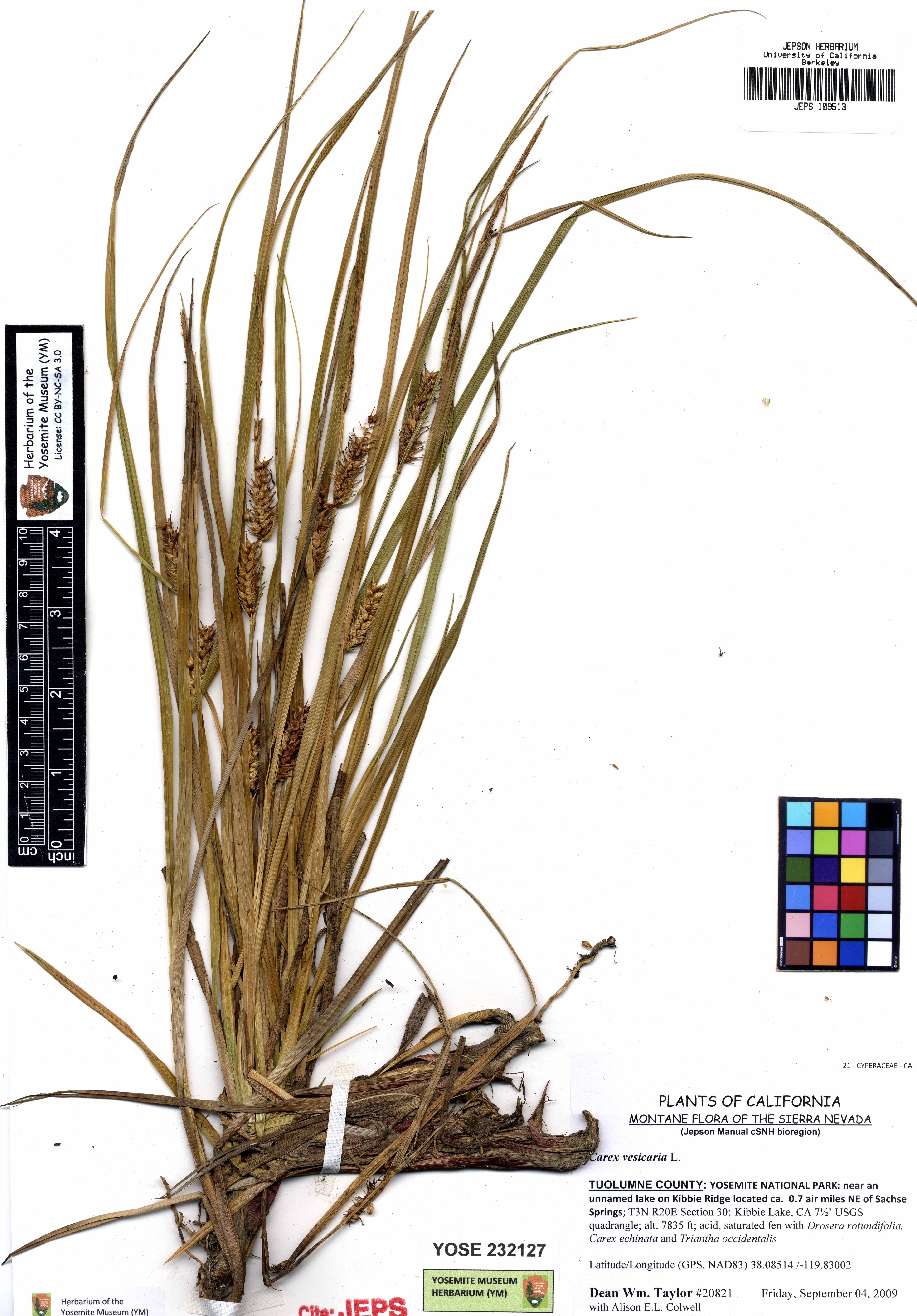 JEPS109513 Carex vesicaria